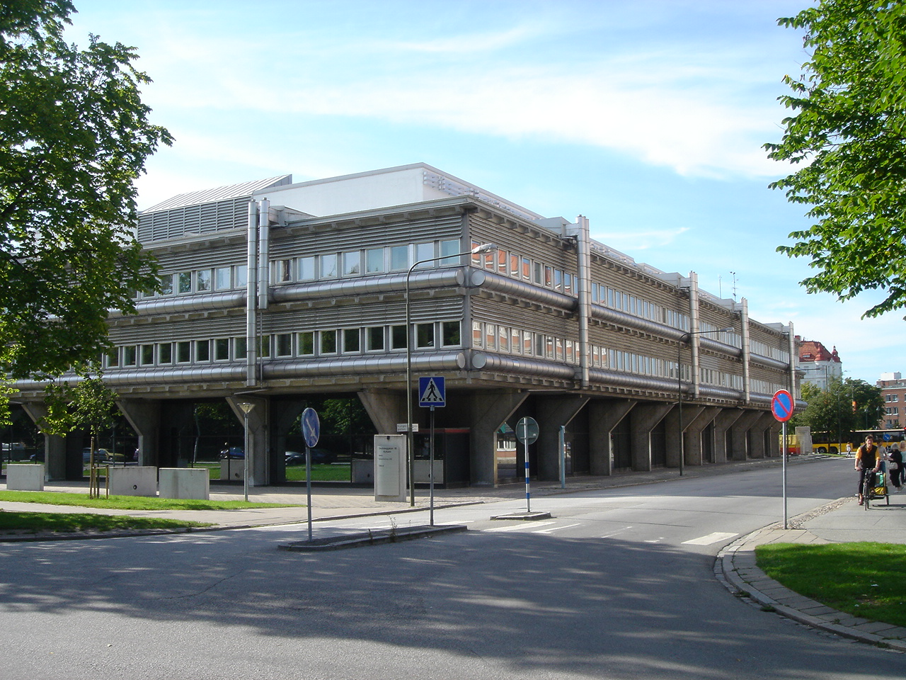 Länsstyrelsen,Kv. Karin,Malmö,Architect Bernt Nyberg